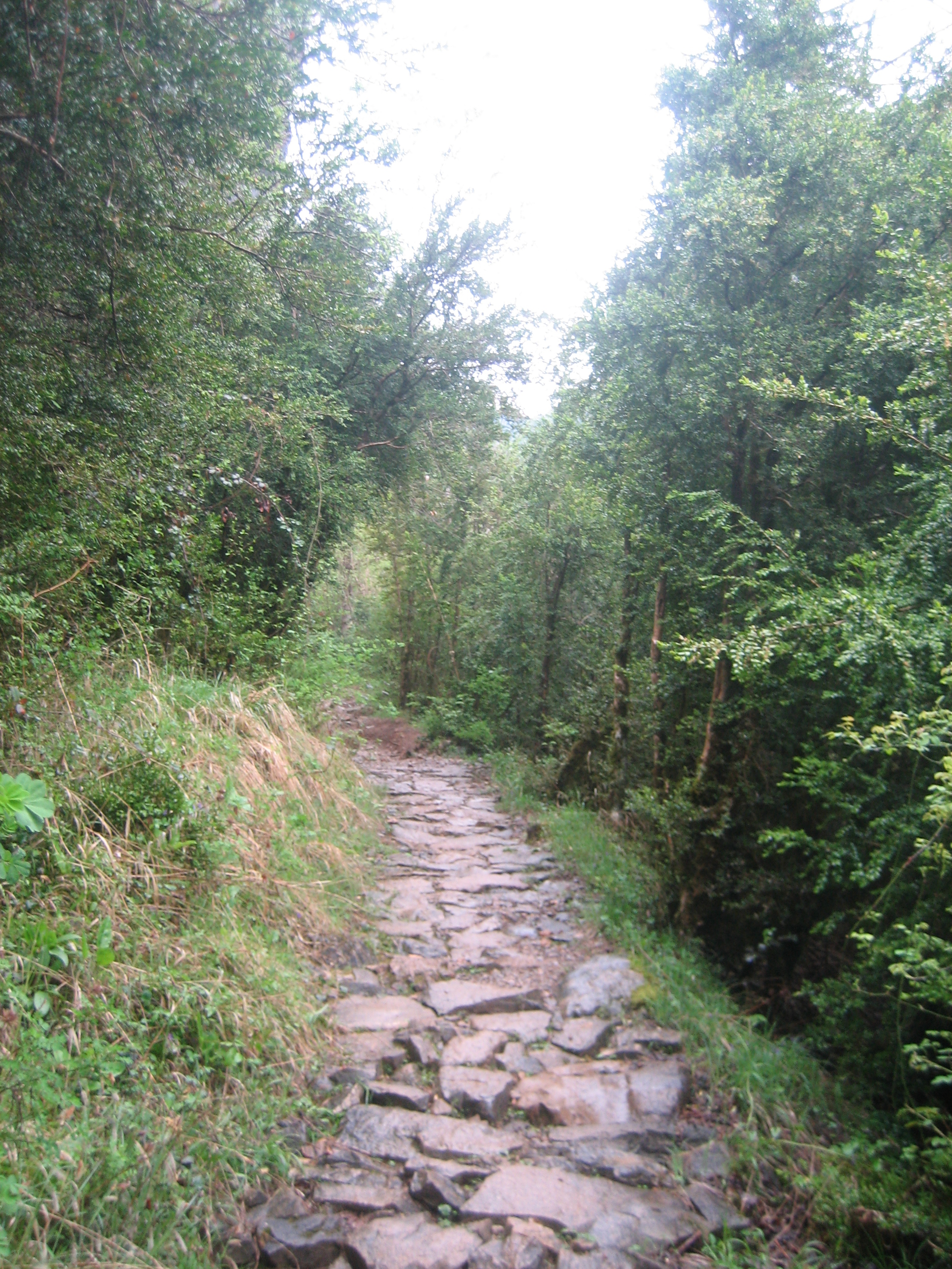 Cañón del Añisclo This is a photography of a Site of Community Importance in Spain with the ID: ES0000016. Natura2000 entry, EEA entry